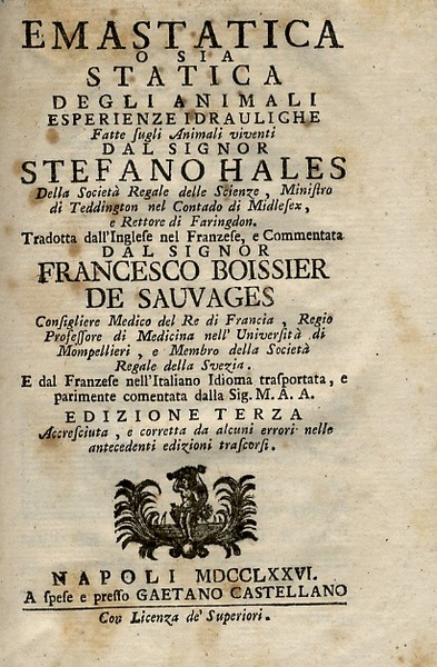 Stephen Hales Emastatica o sia Statica degli animali esperienze Übersetzung ins Italienische MAA, das ist Maria Angela Ardinghelli